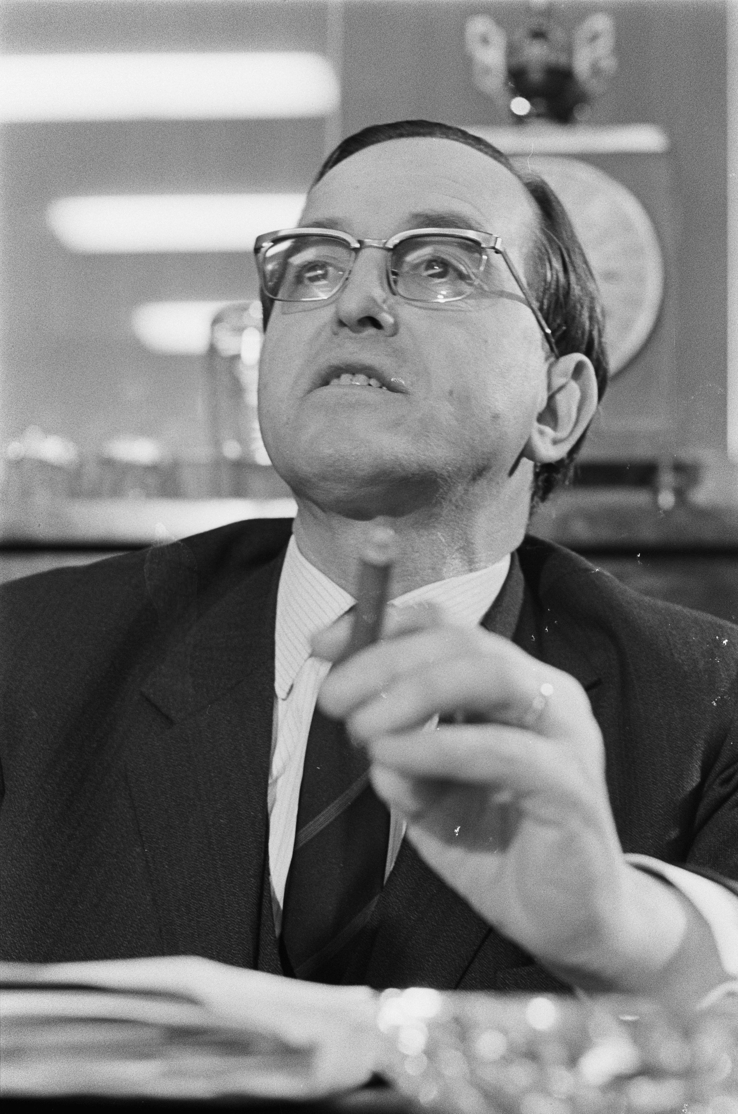 Collectie / Archief : Fotocollectie Anefo Reportage / Serie : [ onbekend ] Beschrijving : Radicalen uit KVP-fractie. Persconferentie radicalen. De heer Aarden Datum : 27 februari 1968 Locatie : Den Haag, Zuid-Holland Trefwoorden : persconferenties, politici, politiek Persoonsnaam : Aarden, Jacques Fotograaf : Nijs, Jac. de / Anefo Auteursrechthebbende : Nationaal Archief Materiaalsoort : Negatief (zwart/wit) Nummer archiefinventaris : bekijk toegang 2.24.01.05 Bestanddeelnummer : 921-1180